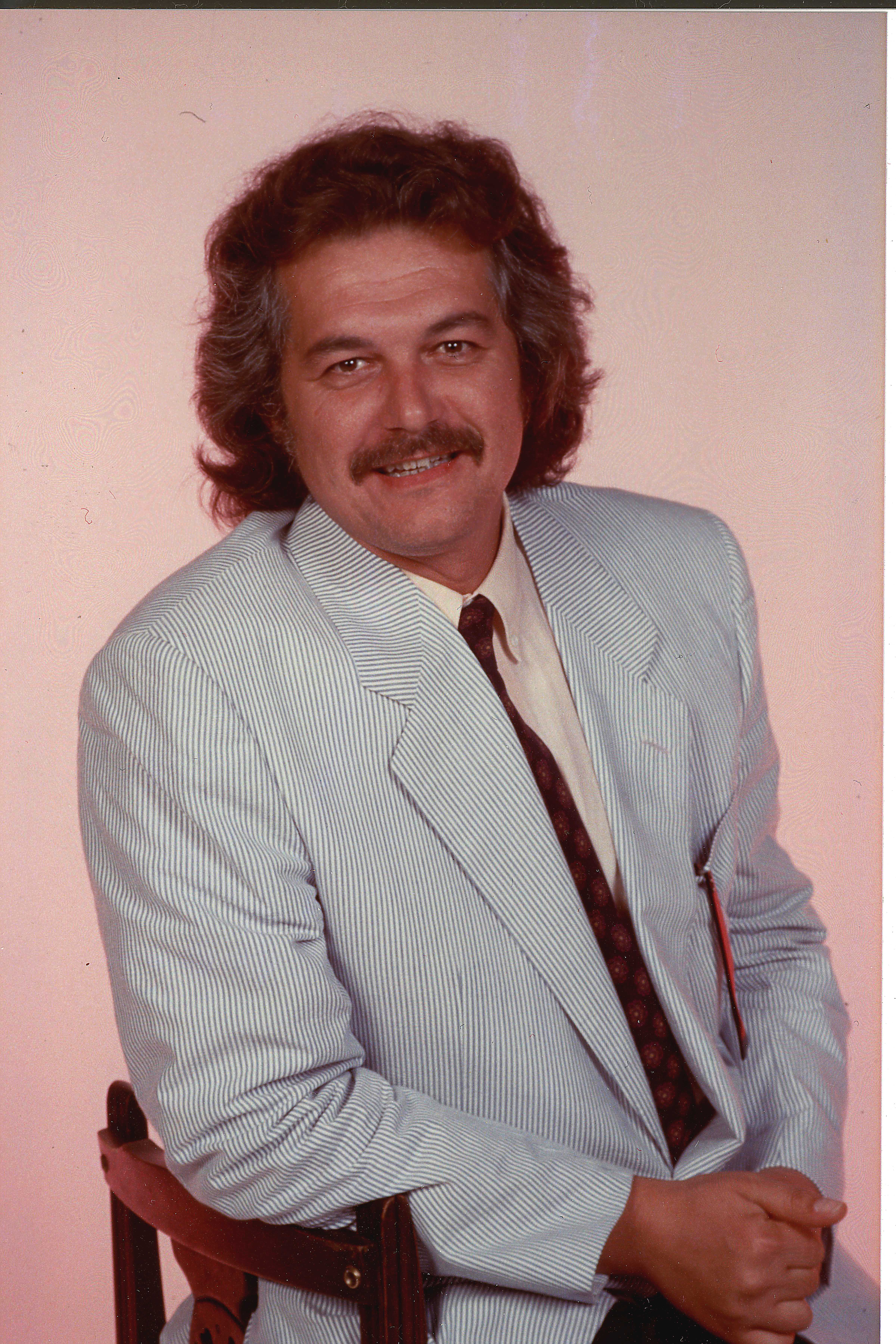 Mario Bianchi in un'immagine anni 90